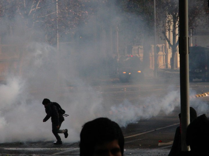 Pleno centro de Santiago cubierto por una nube de gas lacrimógeno